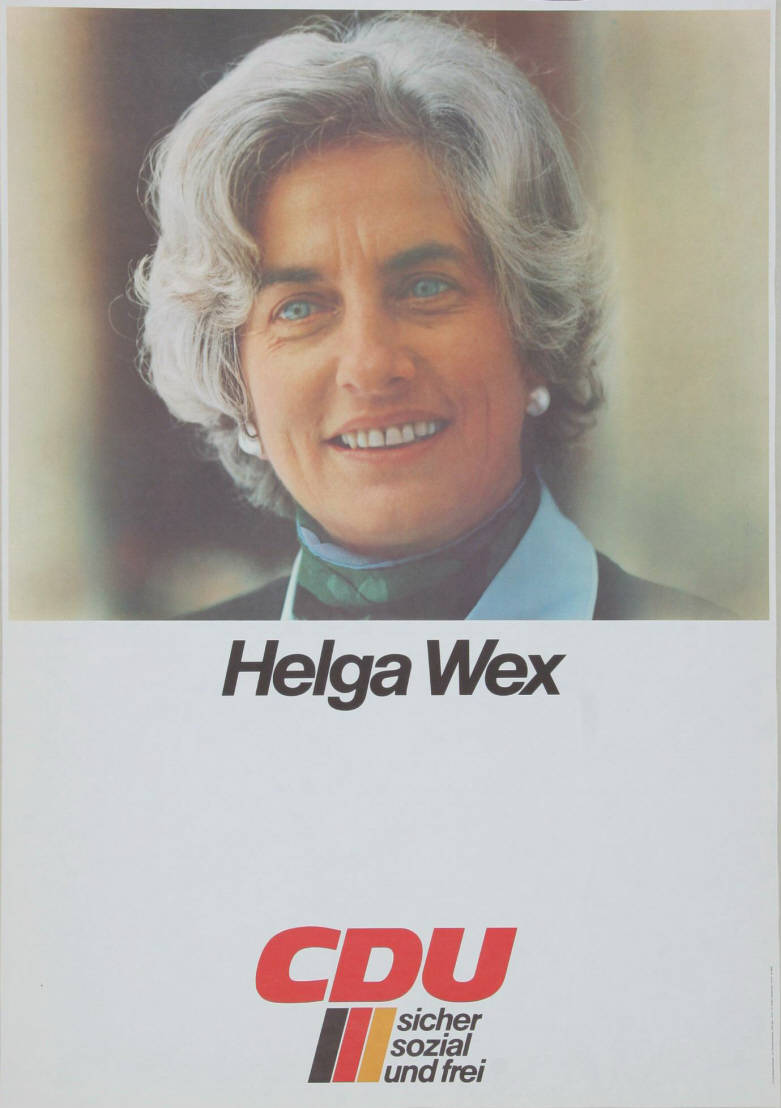 Helga Wex CDU sicher sozial und frei Abbildung: Porträtfoto Plakatart: Kandidaten-/Personenplakat mit Porträt Auftraggeber: CDU-Bundesgeschäftsstelle, Abt. Öffentlichkeitsarbeit, Bonn Drucker_Druckart_Druckort: F. W. Rohden, Wattenscheid Objekt-Signatur: 10-001: 1817 Bestand: Plakate zu Bundestagswahlen (10-001) GliederungBestand10-18: Plakate zu Bundestagswahlen (10-001) » Die 8. Bundestagswahl am 3. Oktober 1976 » CDU » Mit Porträtfoto Lizenz: KAS/ACDP 10-001: 1817 CC-BY-SA 3.0 DE